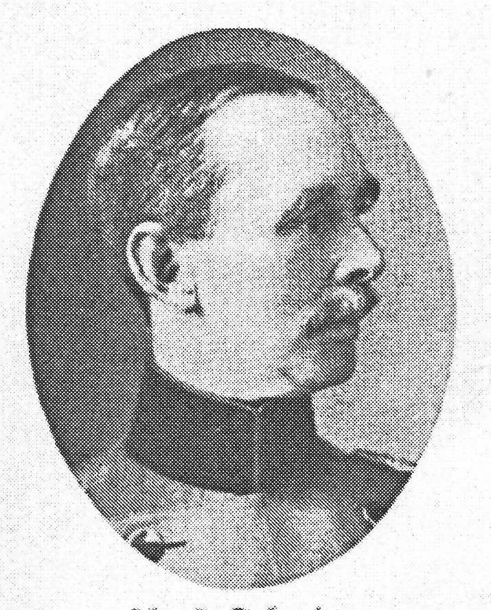 Siegfried Fabarius als Oberst und Kommandeur des Feldartillerie-Regiments Nr. 51